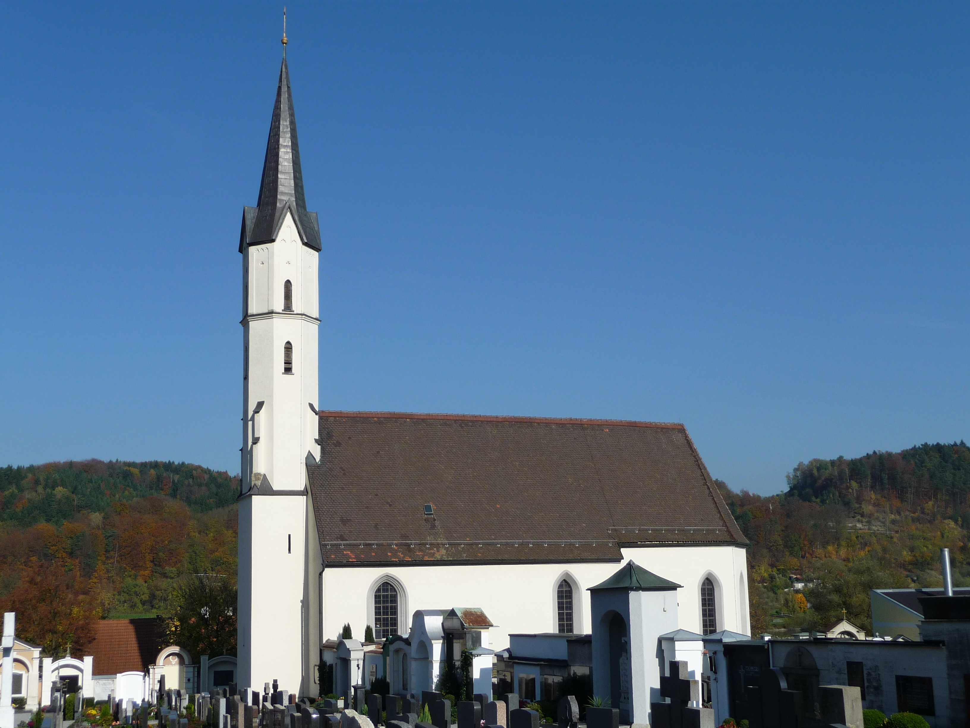 Die Friedhofskirche St. Barbara in Vilshofen an der Donau